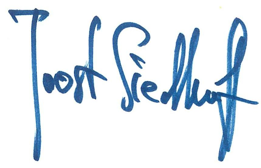 Signatur vom Schauspieler Jost Siedhoff